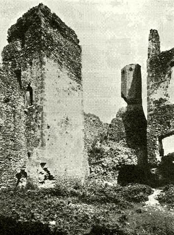 MÁRKI SÁNDOR DÓSA GYÖRGY 1470-1514 A MAGYAR TUDOMÁNYOS AKADÉMIA SEGÉLYEZÉSÉVEL KIADJA A MAGYAR TÖRTÉNELMI TÁRSULAT SZERKESZTI DR. DÉZSI LAJOS BUDAPEST AZ ATHENAEUM R.-T. KÖNYVNYOMDÁJA 1913